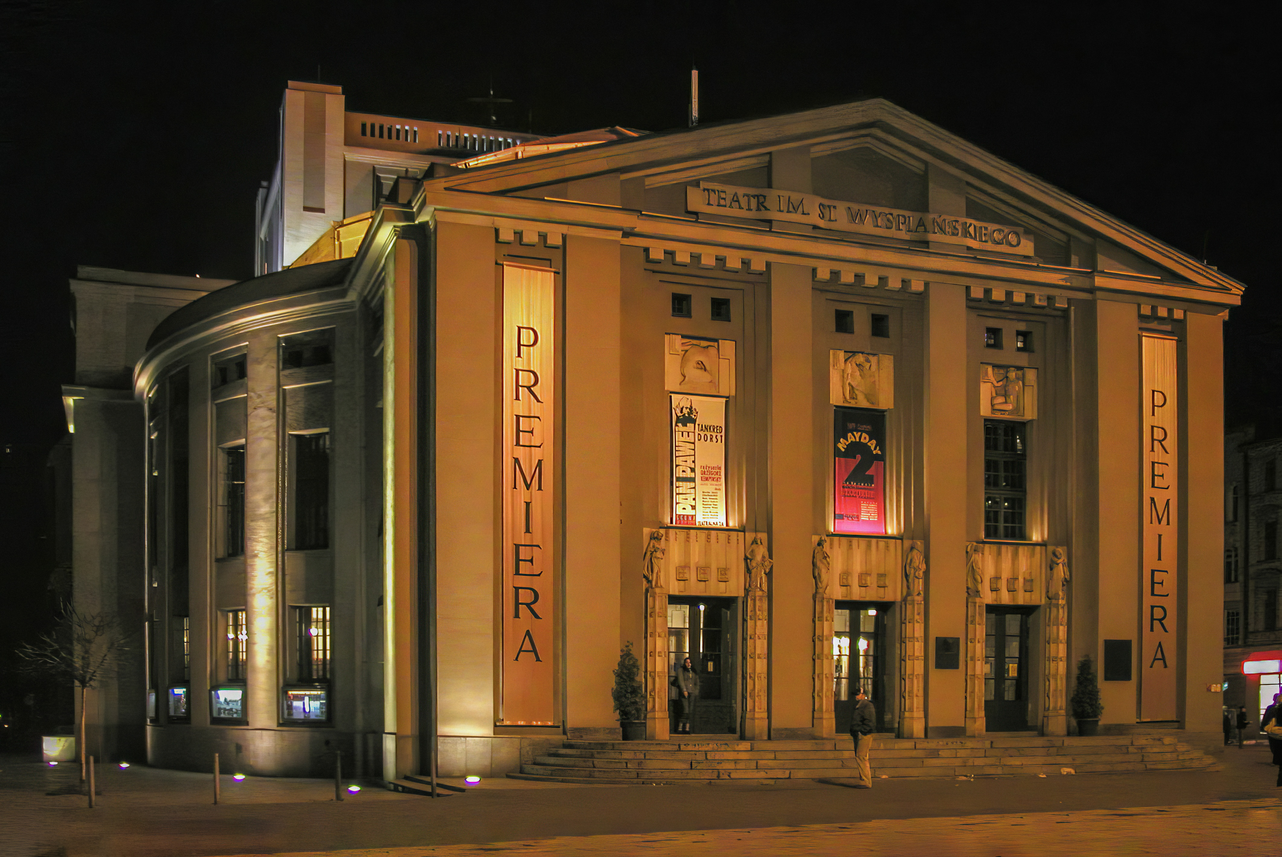 autor: Stimoroll